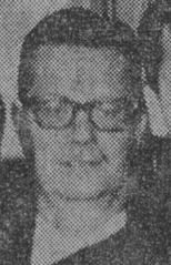 Gunnar Lindman